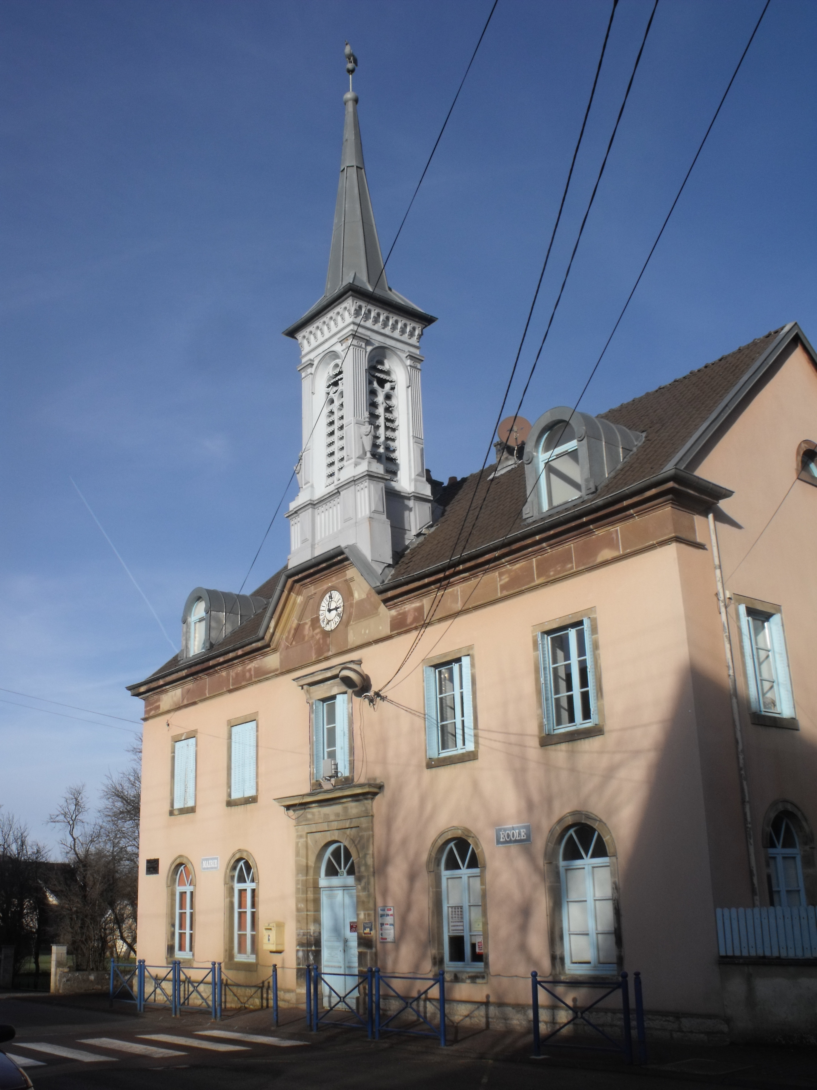 Mairie d'Issans, Doubs, France